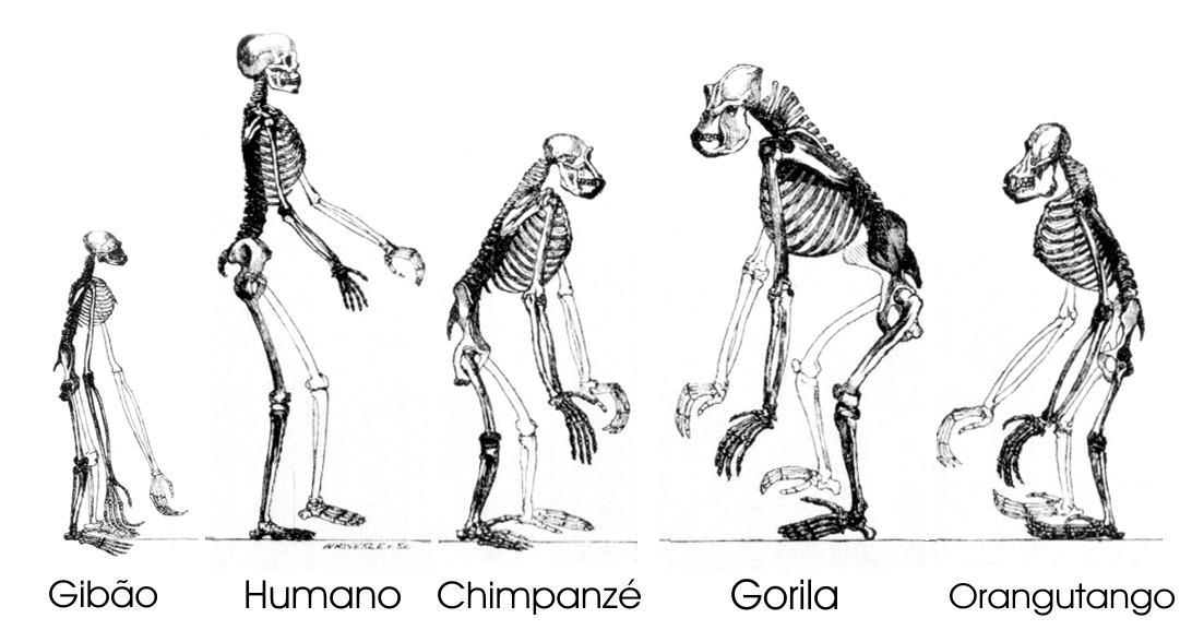 Version of Ape_skeletons.png in portuguese